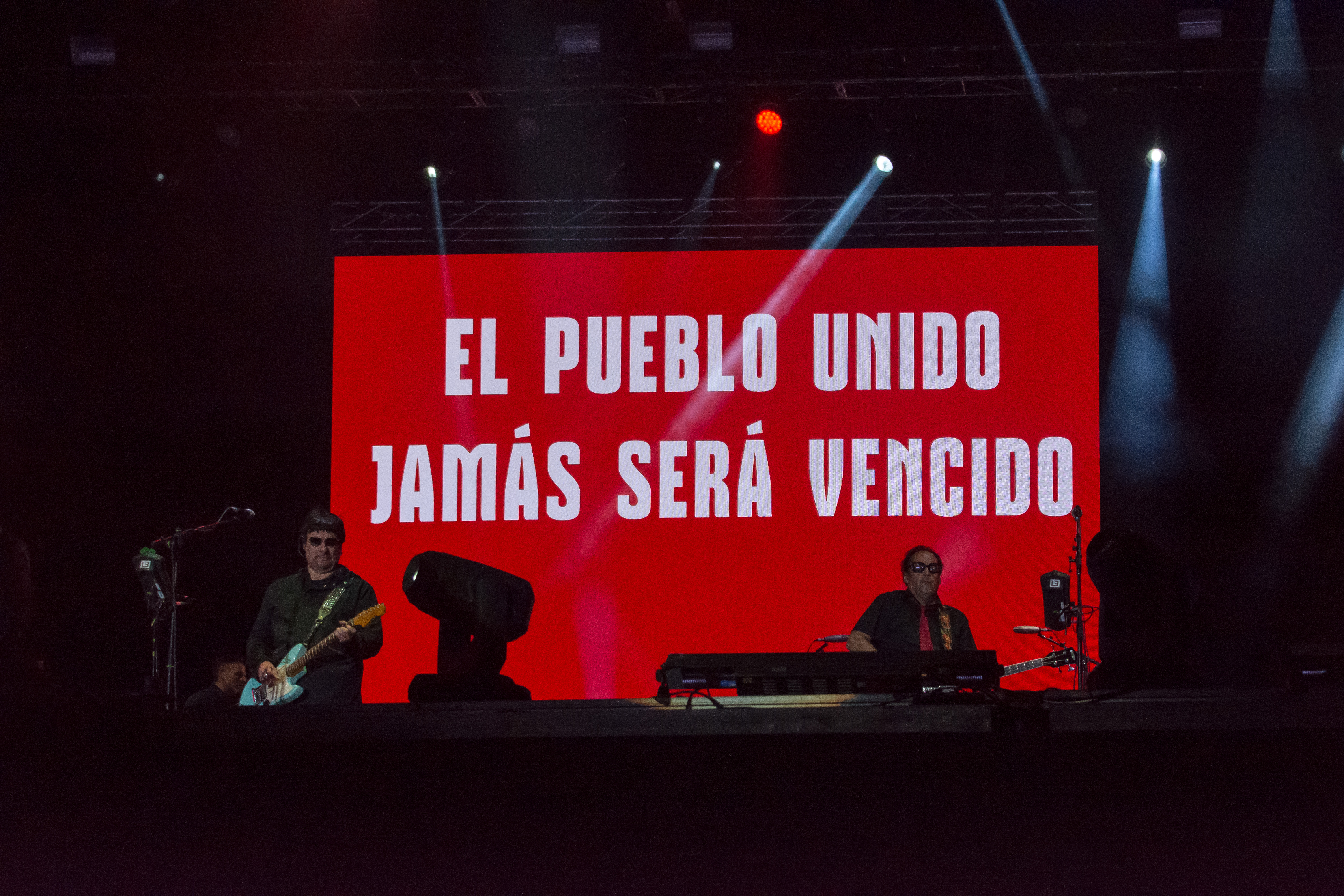 Expo Quillota 2020, Estadio Municipal Lucio Fariña Fernández, Quillota, Región de Valparaíso, Chile